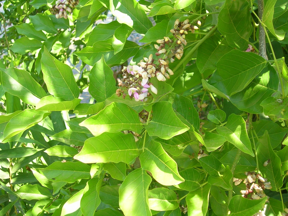 Pongamia pinnata (Millettia pinnata) from Karnataka India